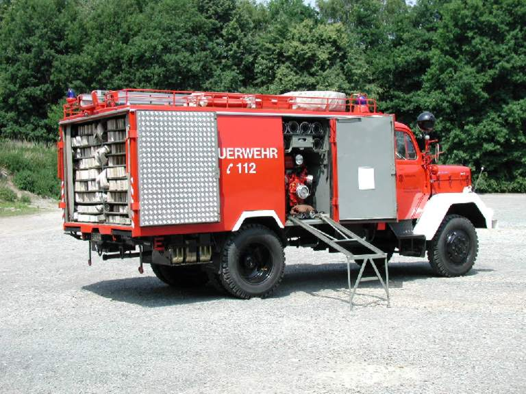 Schlauchkraftwagen der Feuerwehr Braunschweig